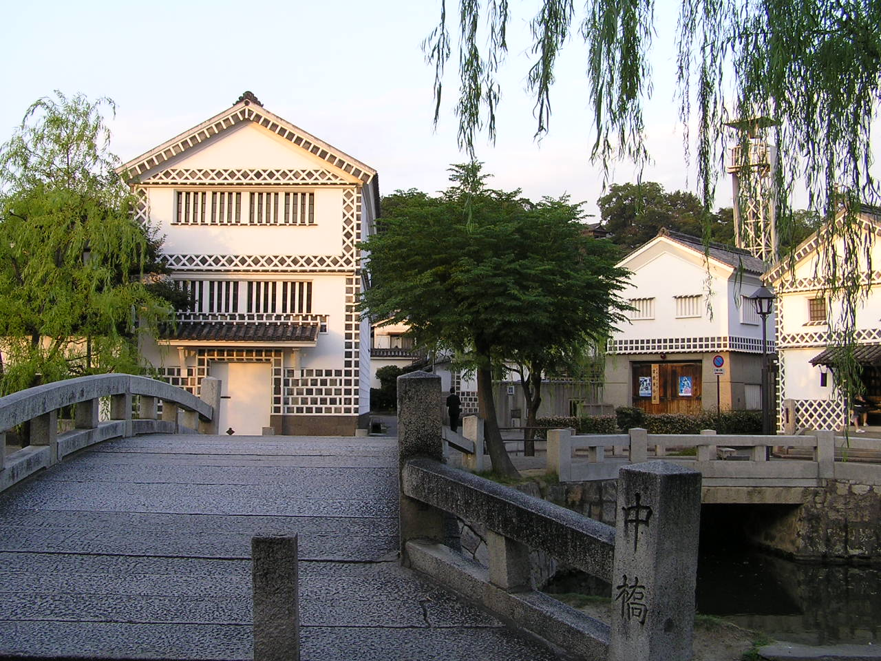 kurashiki bikatiku naka-bashi